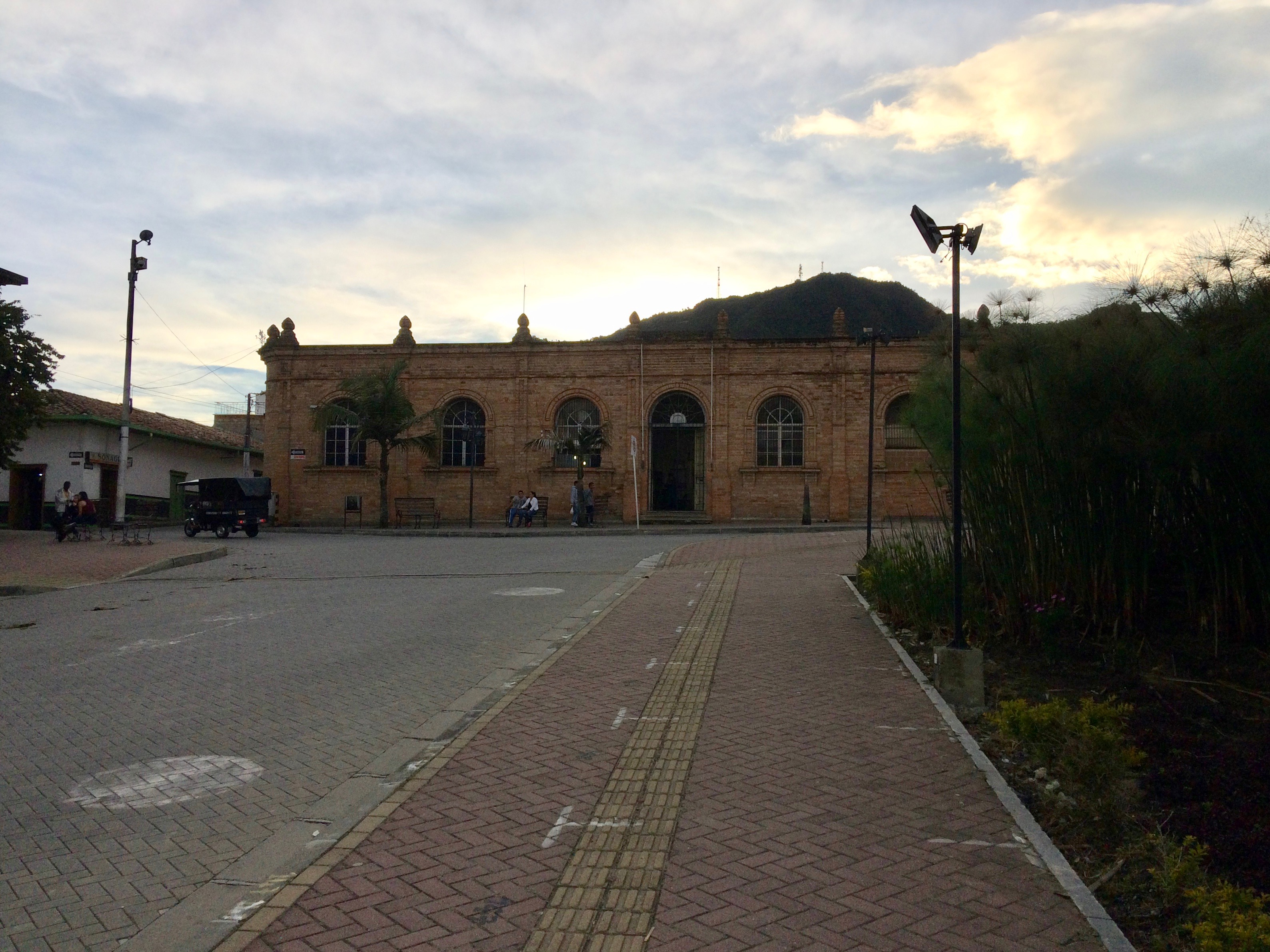 Sede de la Cárcel del Circuito, vista desde la Plazuela de Henao.